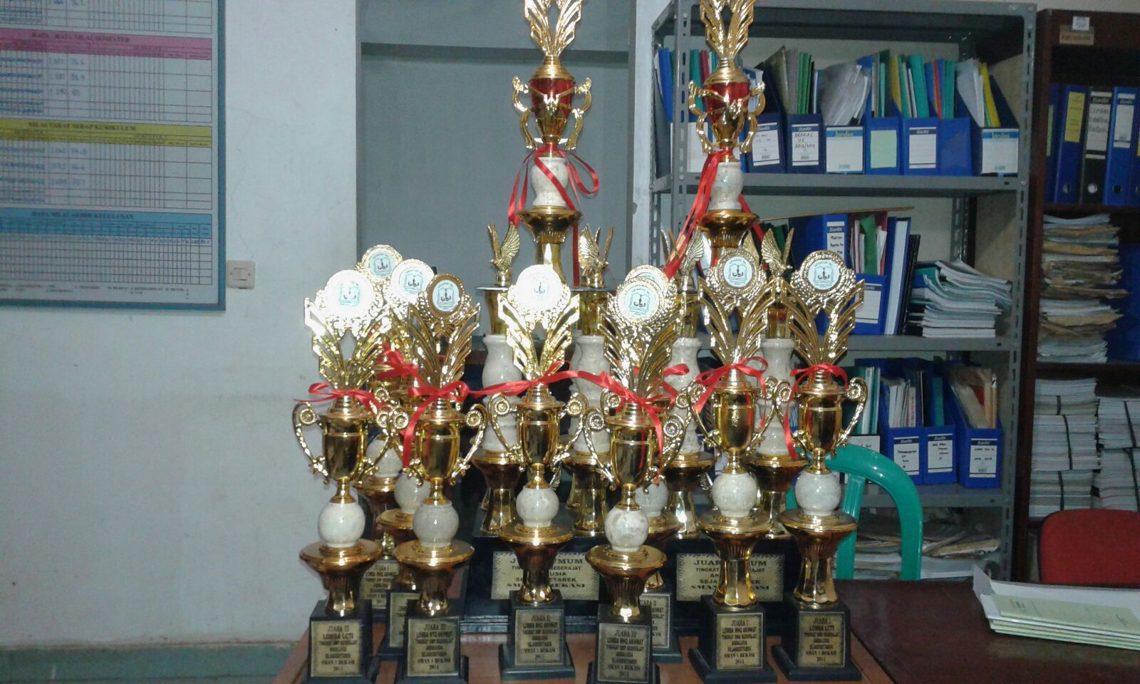 Piala SMP Tashfia Bekasi